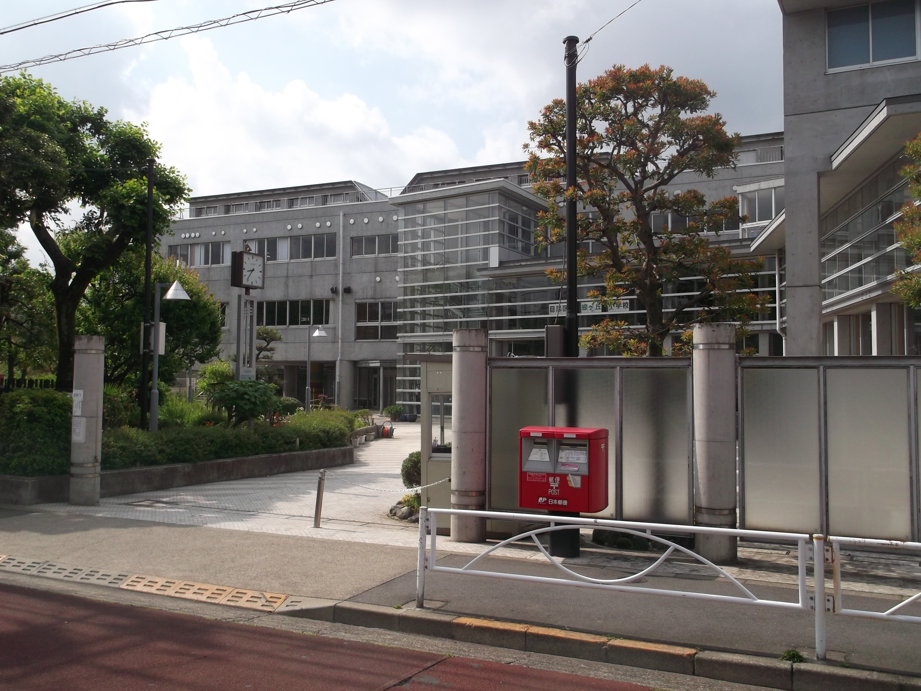 目黒区立緑ヶ丘小学校